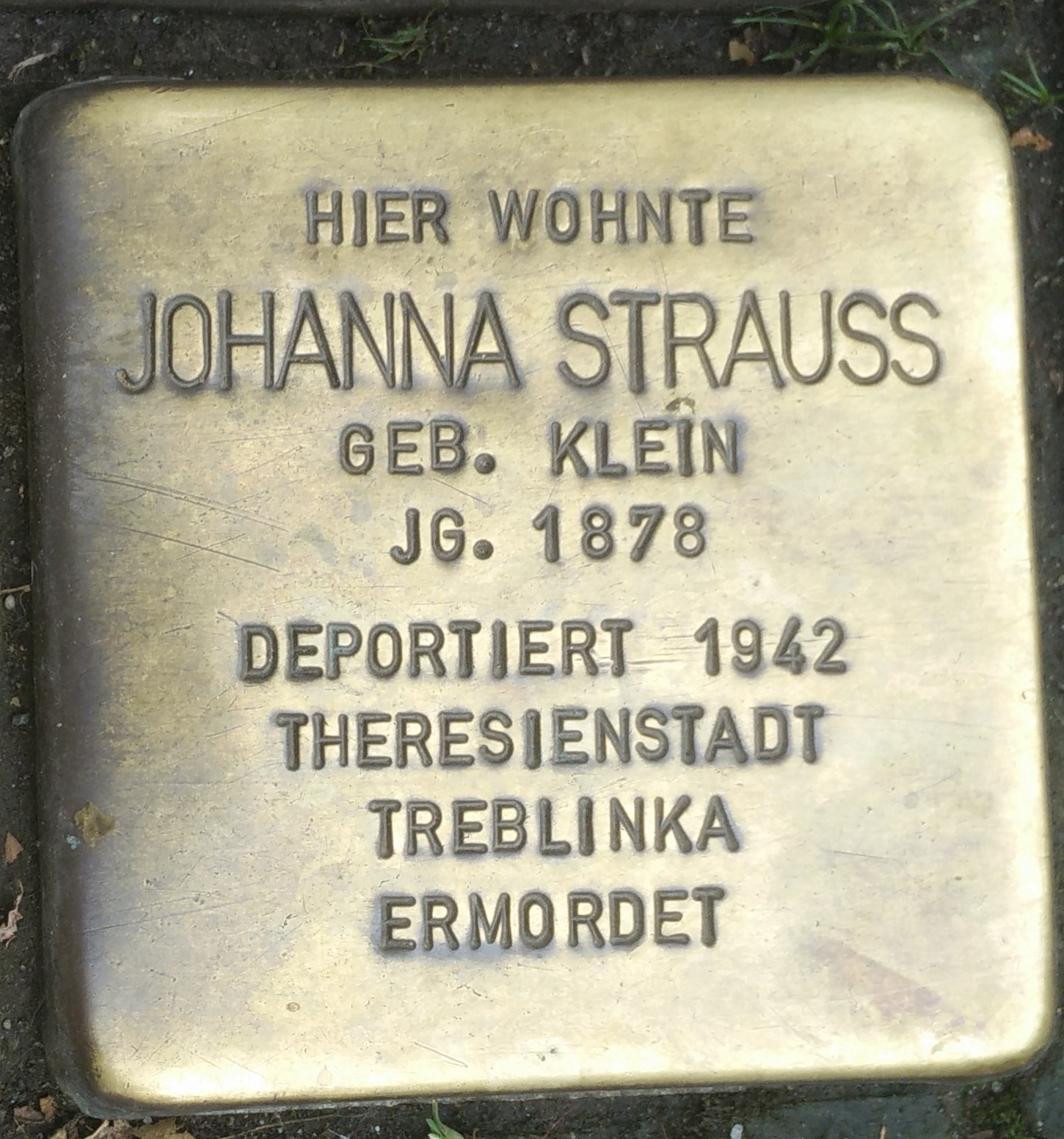 Bad Vilbel, Stolperstein Johanna Strauss